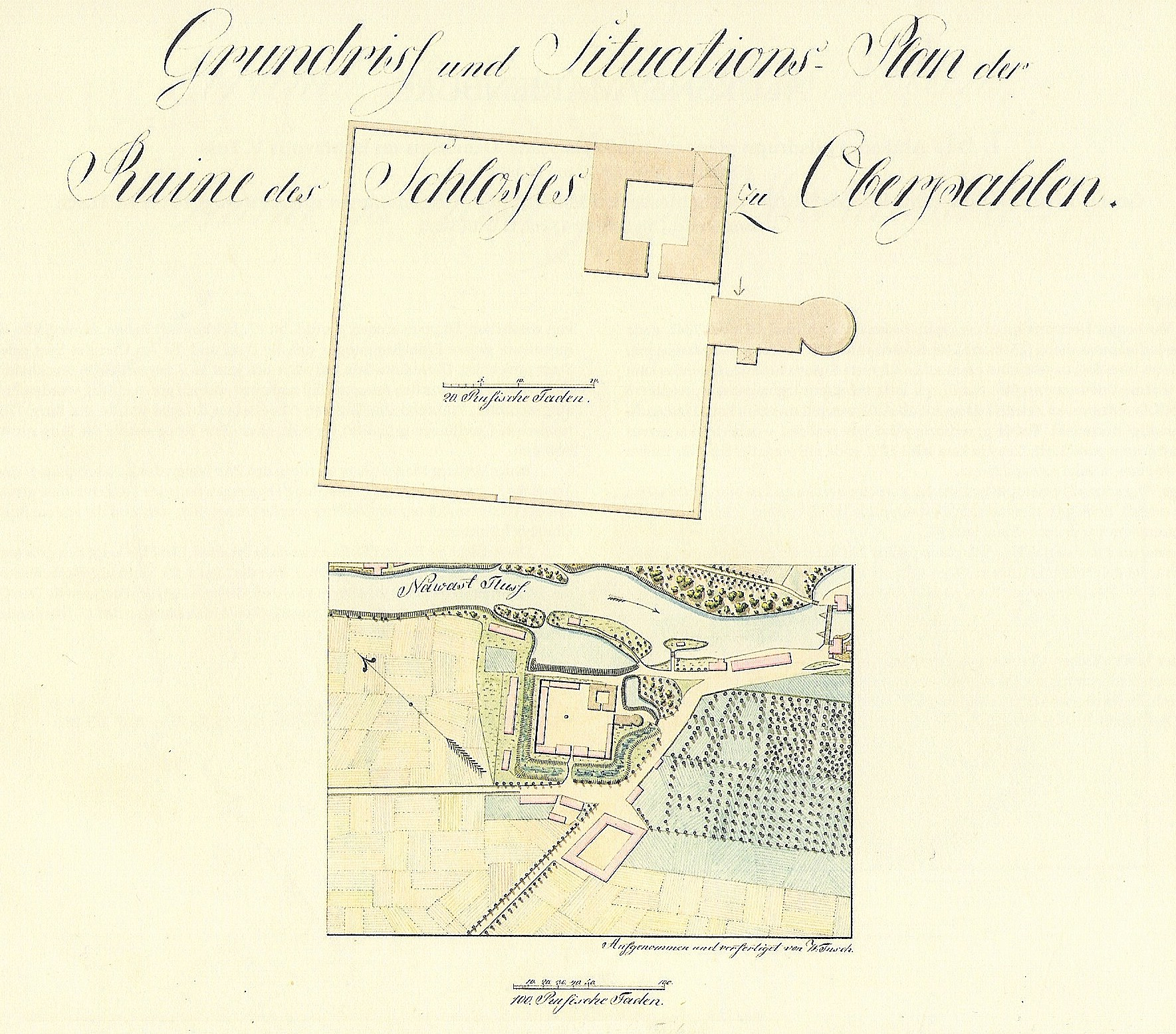 Põltsamaa linnuse asendiplaan. Paulucci album